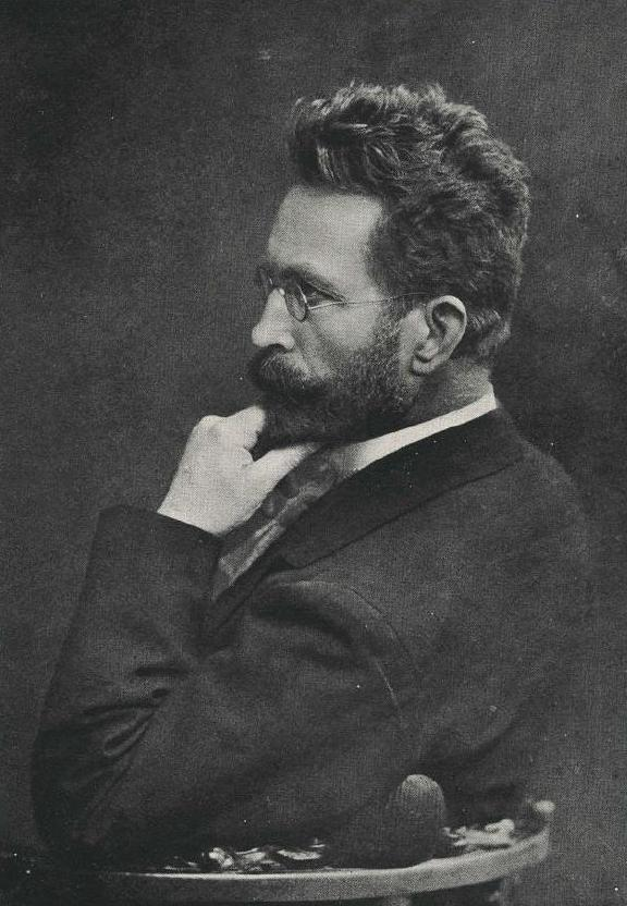 Gustavo Eberlein, nombre de nacimiento Gustav Eberlein (* 14 de julio de 1847, Spiekershausen - † 5 de febrero de 1926, Berlín), fue un alemán escultor, pintor y escritor. En 1900 fue, tras Reinhold Begas, el artista más activo de la escuela de escultura de Berlín del siglo XIX.